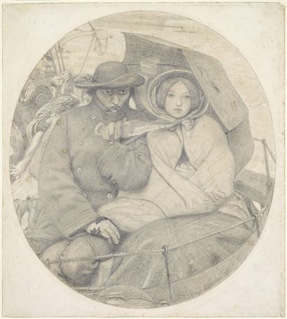 Studie für The Last of England